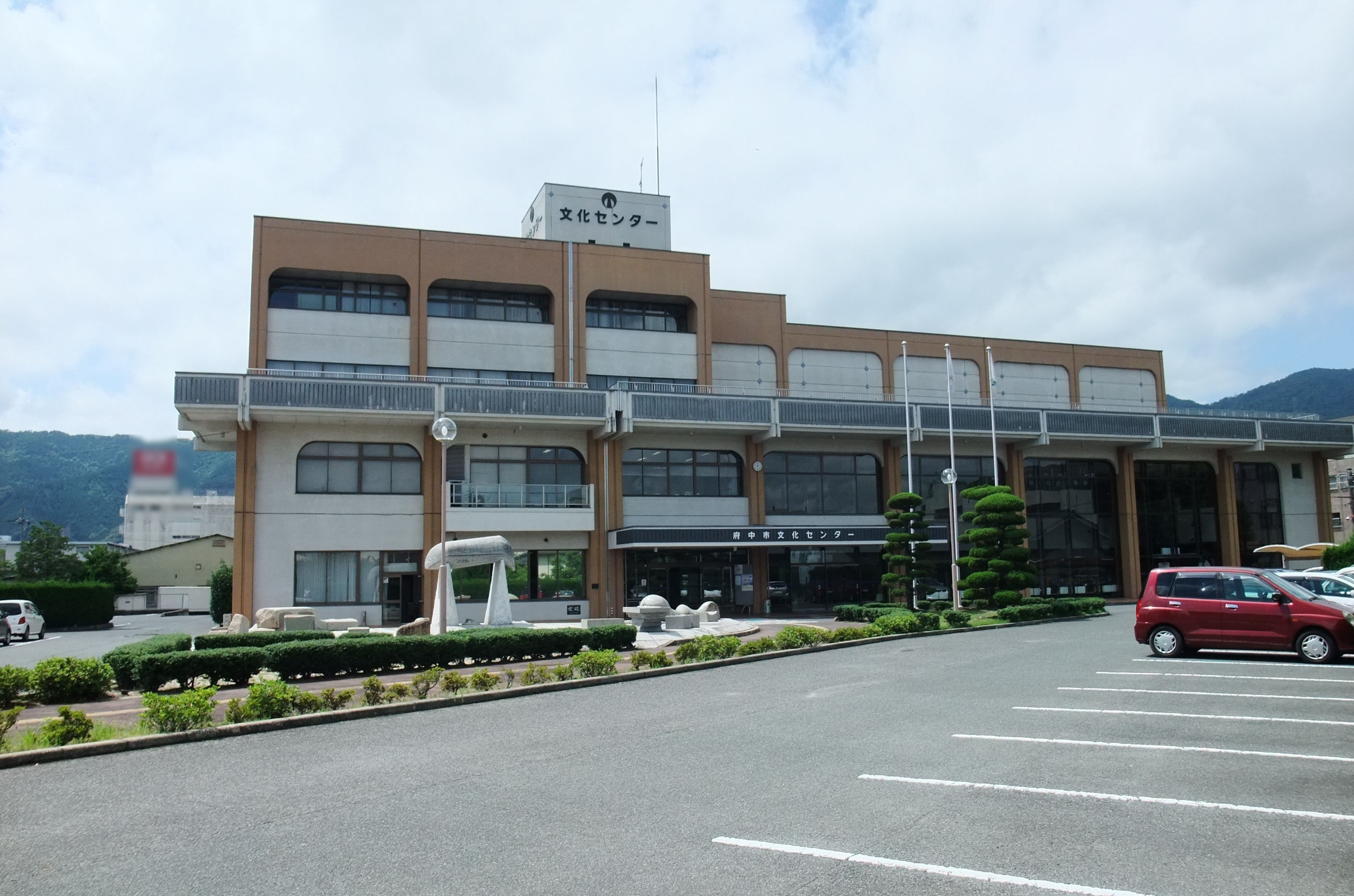 広島県府中市の府中市文化センター外観